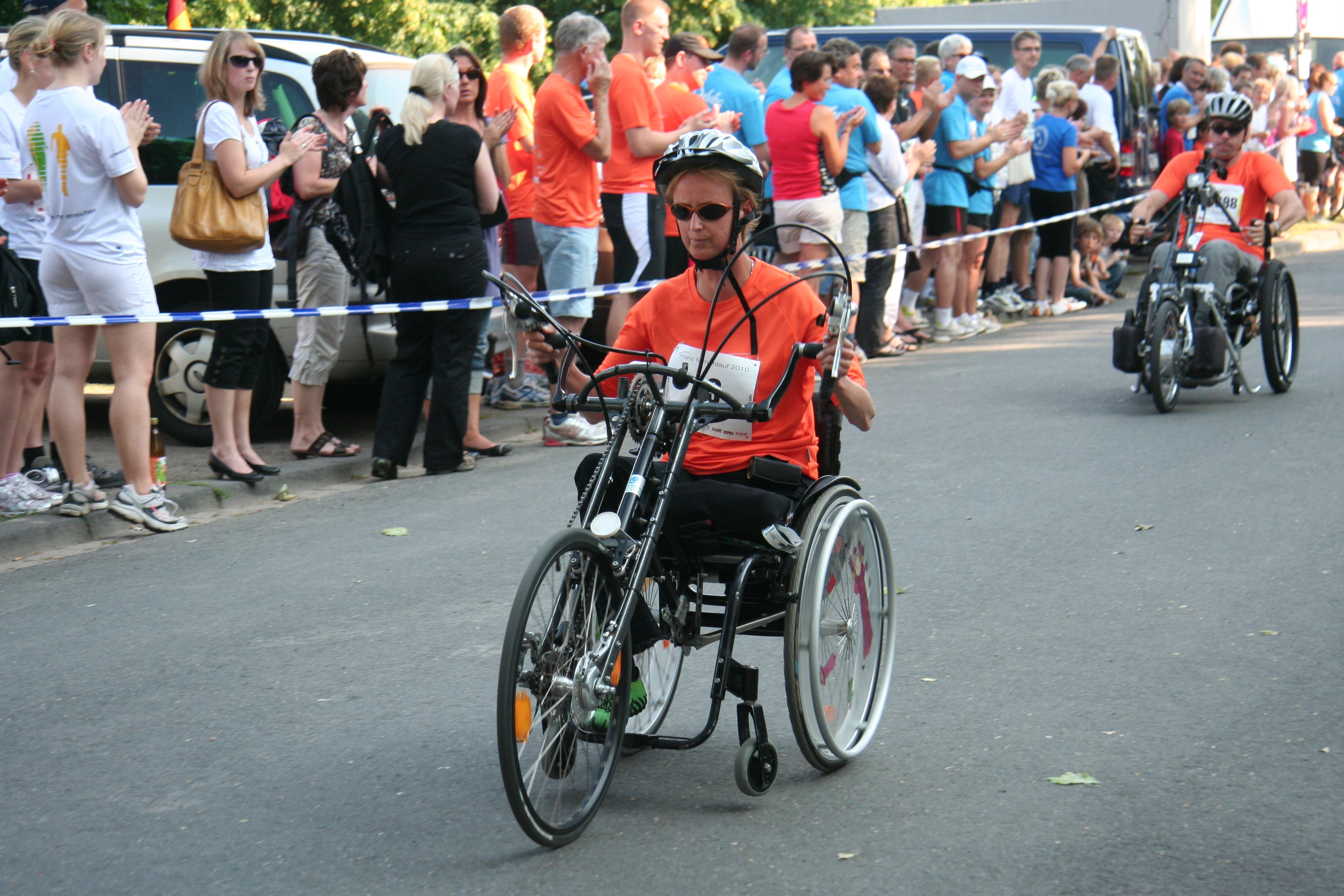 Münz Firmenlauf 2010 – Behinderte Sportler beim Münzlauf in Koblenz; im Bild eine Teilnehmerin mit einem dem Rollstuhl vorgesetzten Handbike